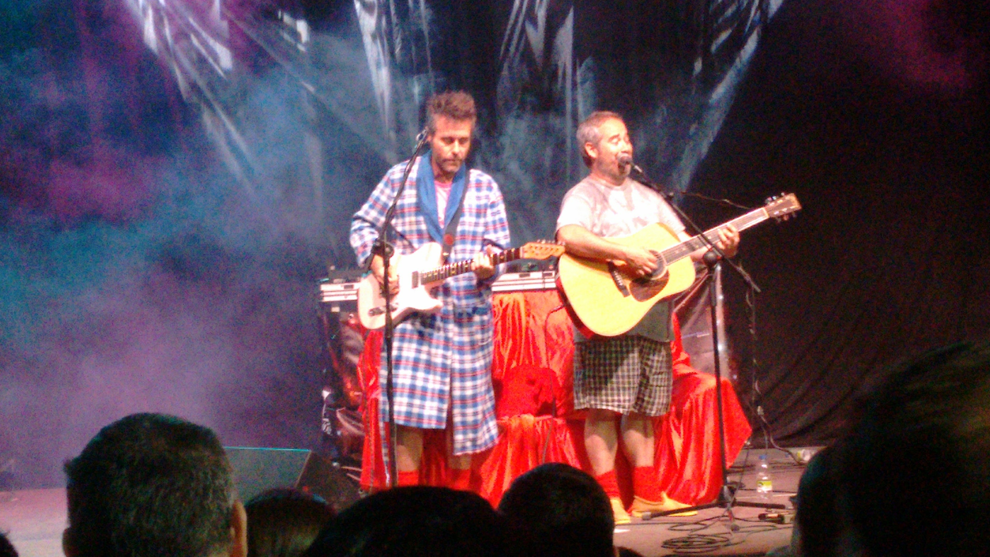 El grupo de rock aragonés 'Los Gandules', tocando en las fiestas del Valdespartera, Zaragoza, el 9 de junio de 2017